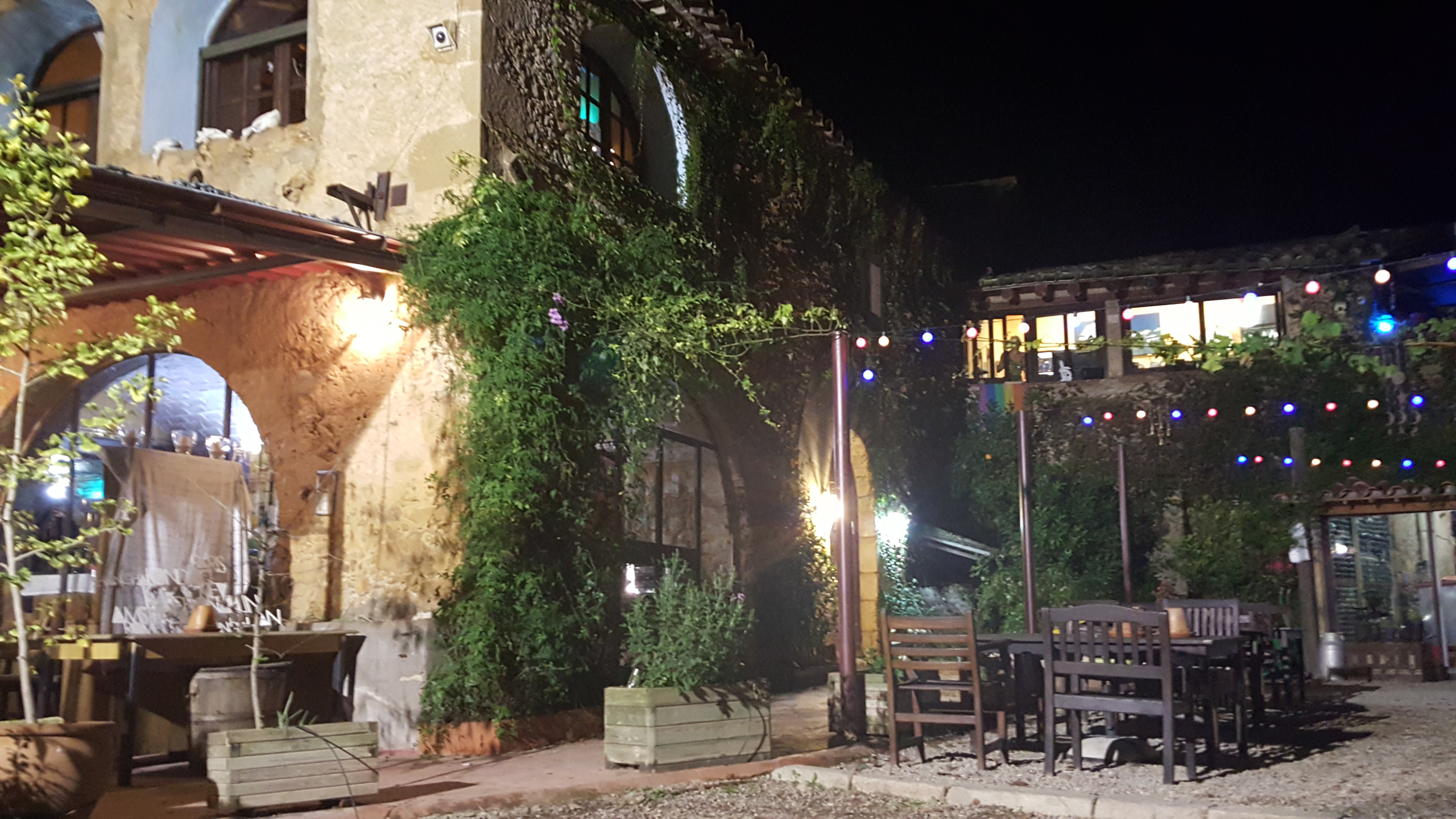 Mas Torrencito, Turisme rural amb gossos. Casa Rural onde se permit gossos de tot tipo